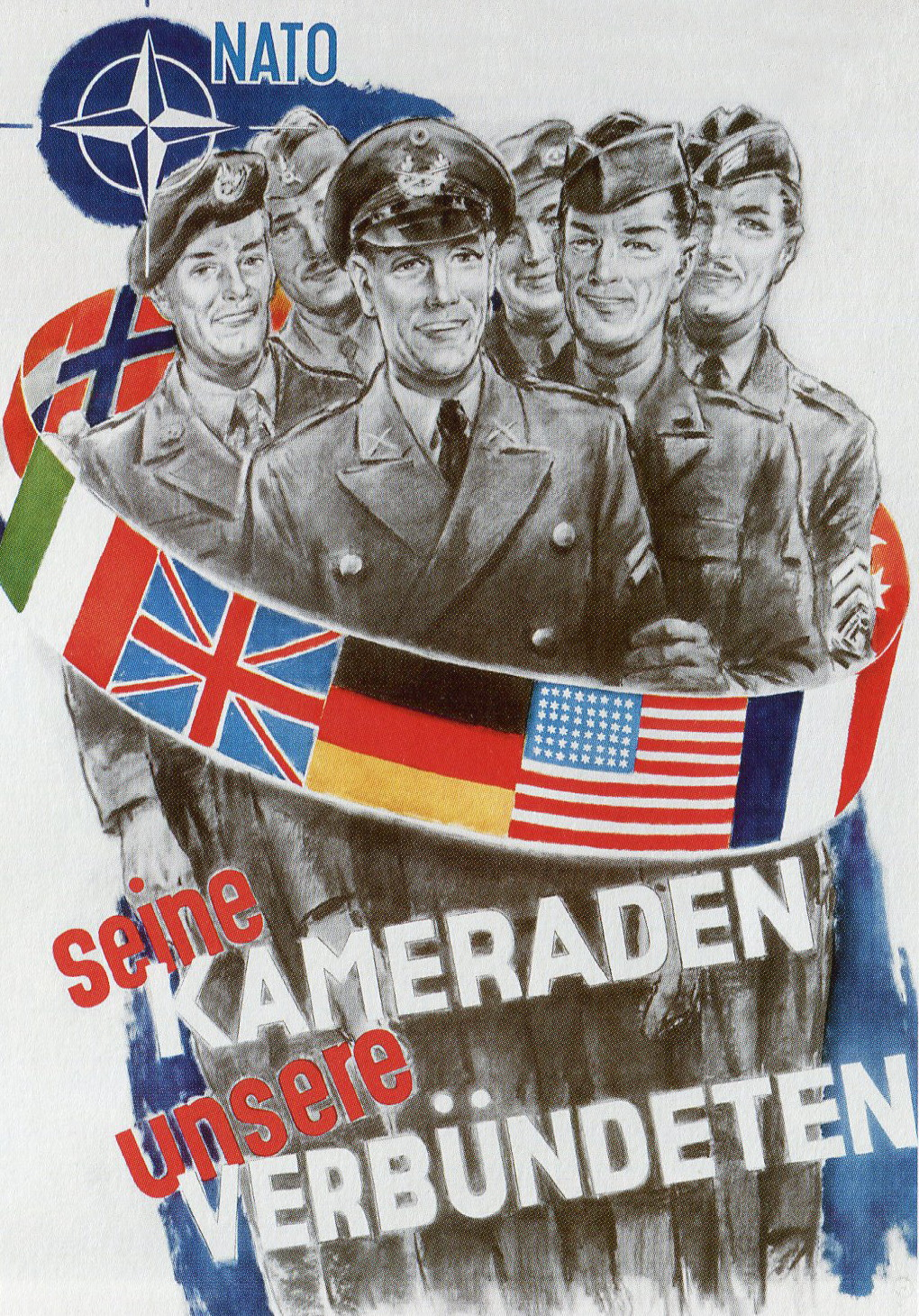 Plakat NATO "Seine Kameraden - undere Verbündeten". Illustration von Helmuth Ellgaard